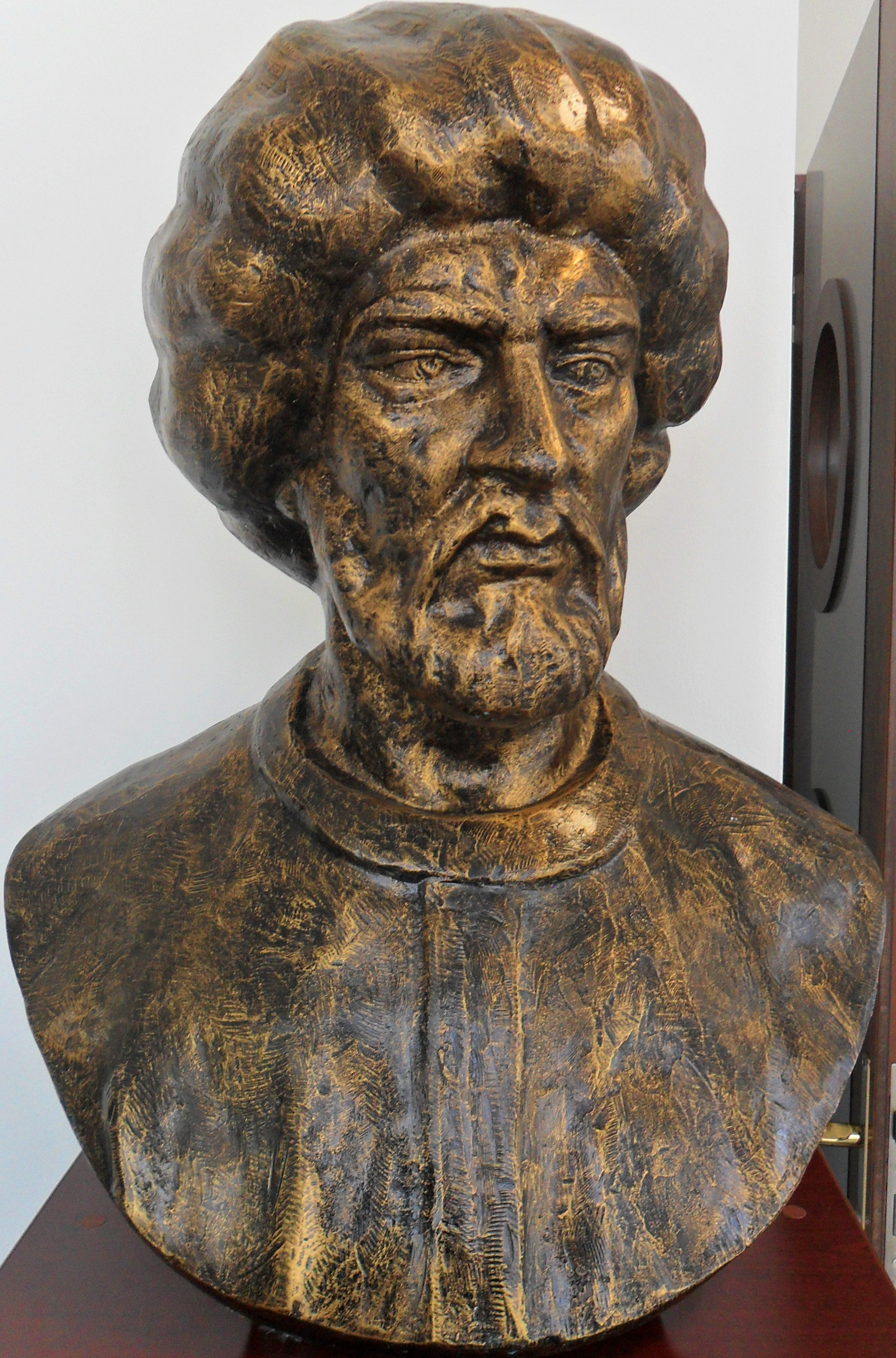 Mersin Deniz Müzesinde bulunan Mezamorta Hüseyin Paşa büstü.